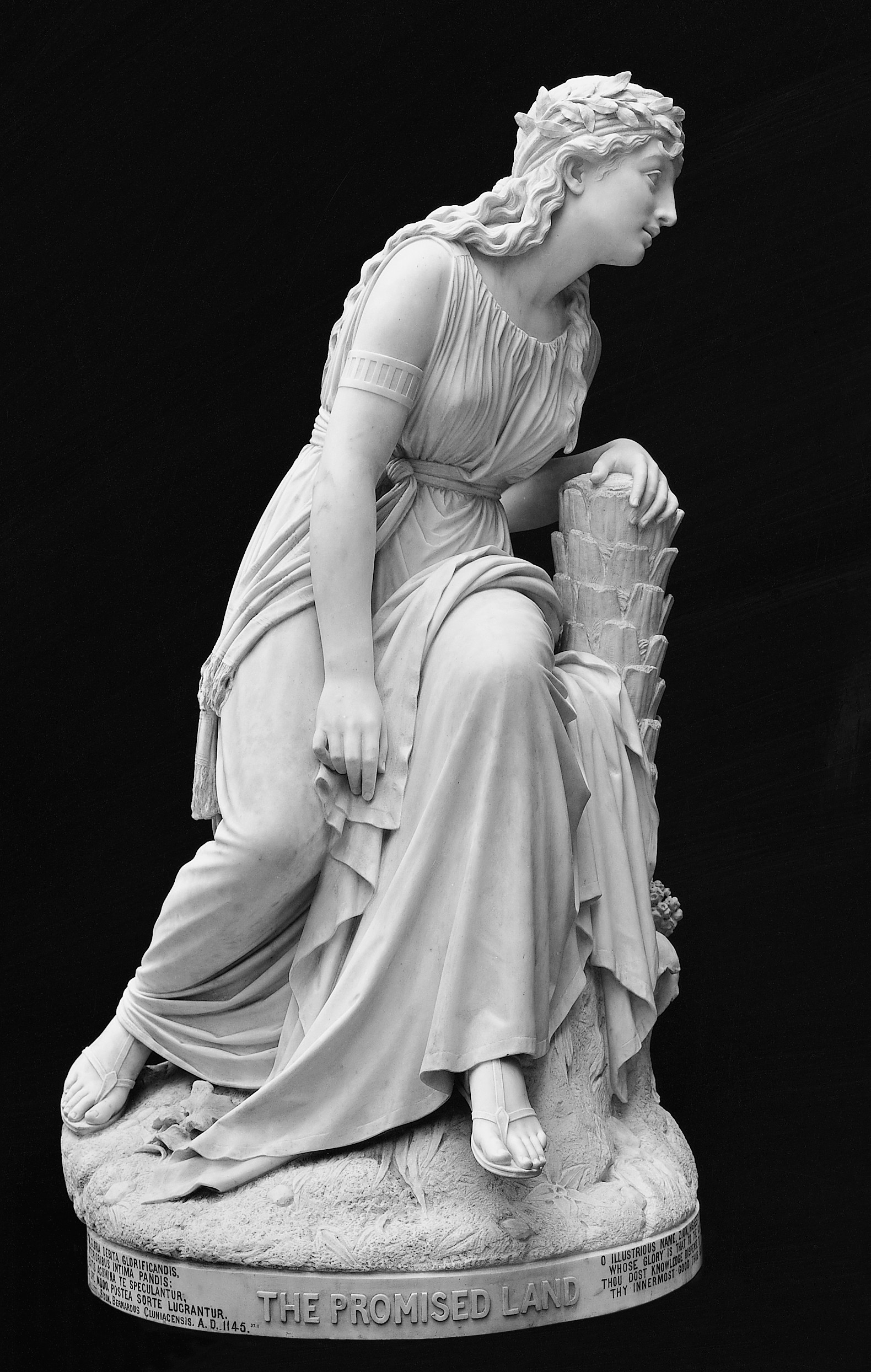 Sculpture; Sculpture